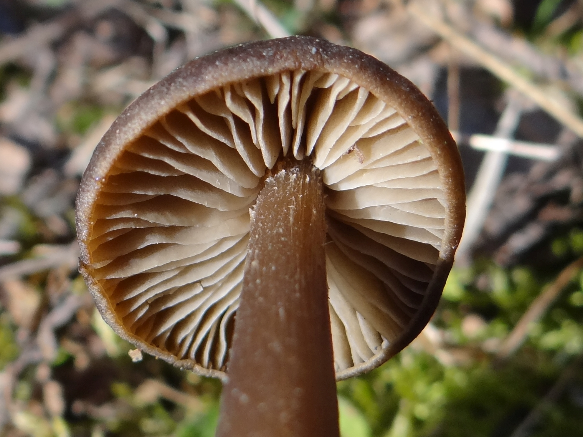 Entoloma vernum (location: Poland, Beskid Wyspowy, Pasmo Łososińskie)